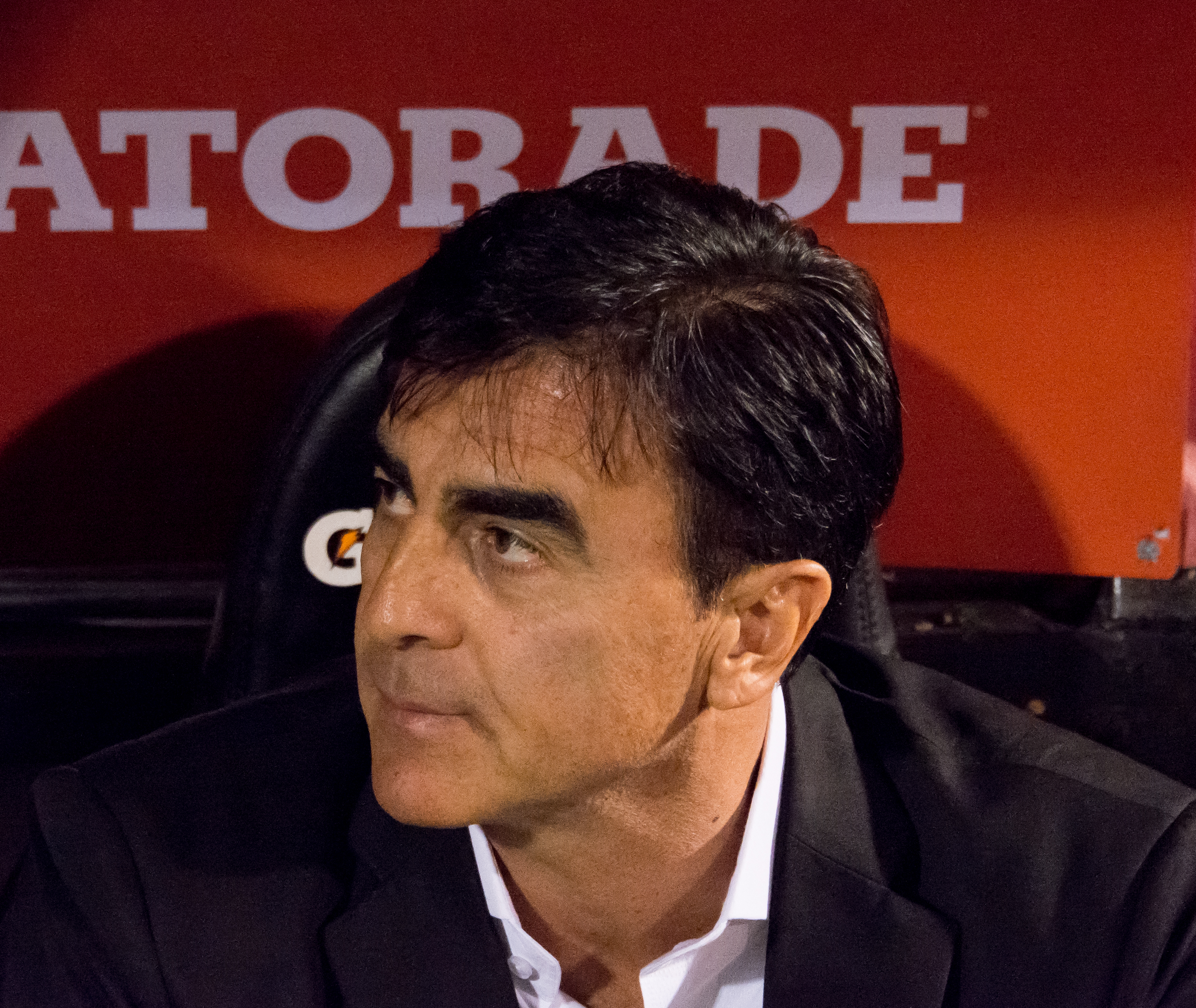 Gustavo Quinteros, Universidad Católica v Rosario Central, Estadio San Carlos de Apoquindo, Las Condes, Santiago, Chile.